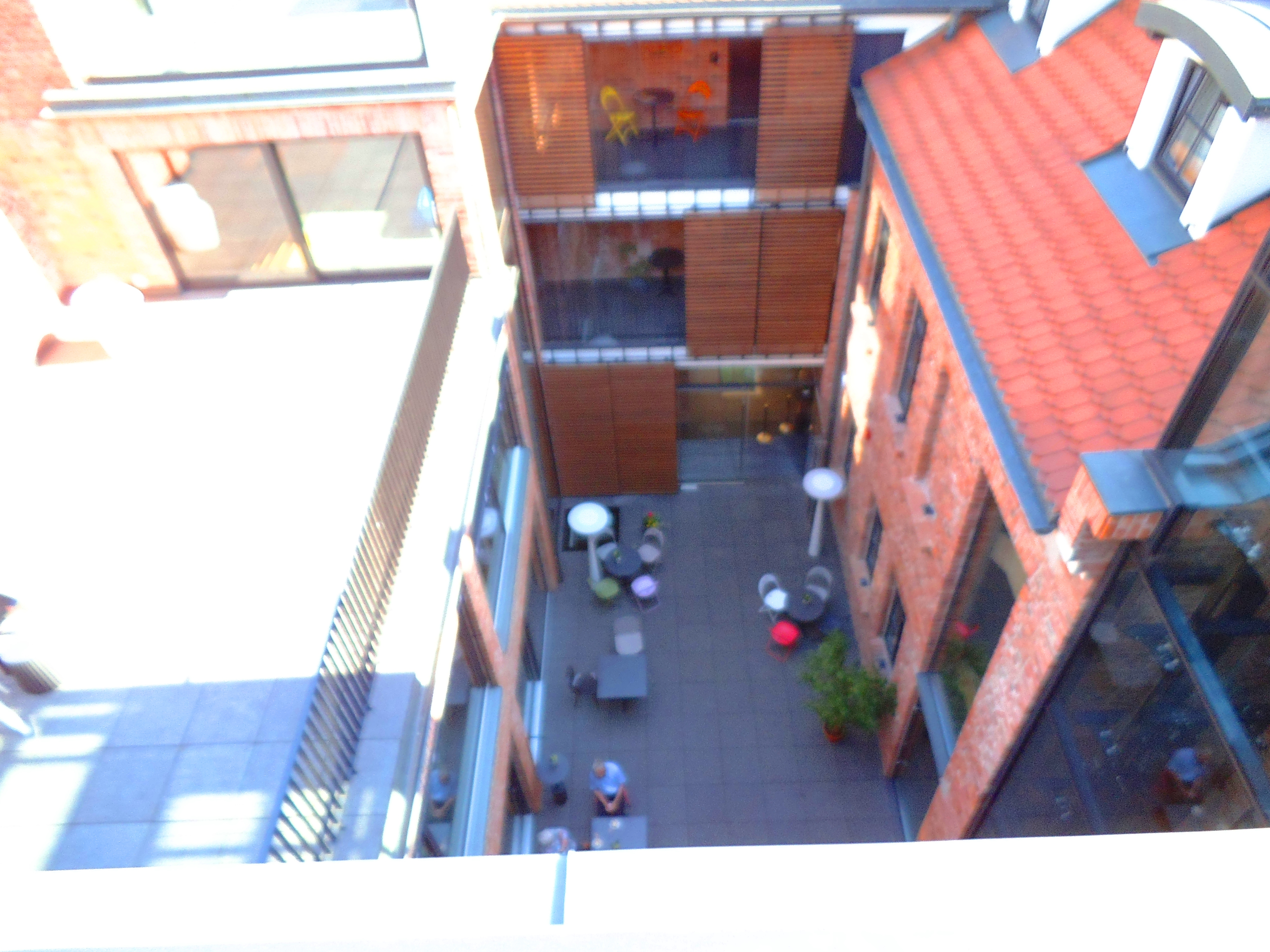 Hotel Nicolaus w Toruniu, patio